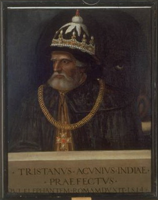 Ritratto di Tristano da Acugna ambito raffaellesco Misure: 750 mm x 960 mm Notizie storico-critiche: Il ritratto venne probabilmente tolto dal Museo di Borgovico per essere portato nella casa Grande dei Giovio, oggi corrispondente ai numeri 107 e 109 di via V.Emanuele.cfr. Rovelli, 1928, p.157. Qui rimase agli eredi con cognome Giovio fino circa alla metà del xix secolo, quando l'ultimo discendente, Paolo Giovio, vendette gli immobili a Pietro Baragiola e divise fra le nipoti e le figlie la collezione dei ritratti. Il dipinto venne spedito a Como nel maggio 1549. Unica derivazione è l'incisione dello Stimmer (P.Giovio, 1575, p.230). L'esploratore portoghese fece il suo ingrsso trionfale in Roma il 12 marzo 1514, portando a Leone X le spoglie della sua recente conquista dell'India: è a questo che si riferisce l'iscrizione nel quadro. Se questo quadro fosse stato realizzato per Giovio mentre Tristano era a Roma, sarebbe il più antico dipinto della collezione Giovio. E' possibile che il dipinto sia stato copiato da un altro di bottega raffaellesca fatto quando Tristano era a Roma, tra il 1514 e il 1520; esso sembra anche essere l'unico ritratto conosciuto di Tristano del xvi secolo. cfr. scheda Klinger nell'Archivio Musei Civici di Como.